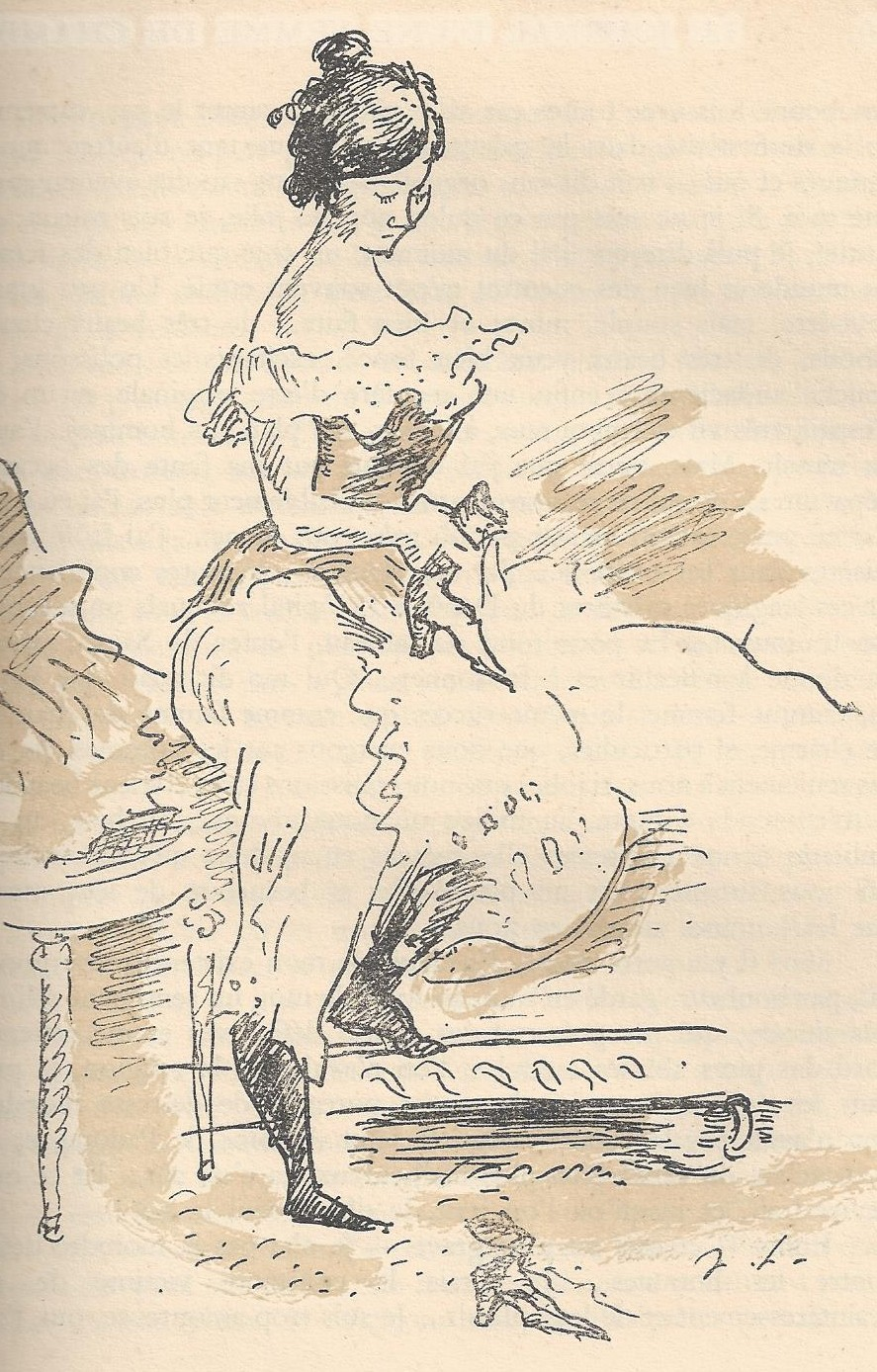 Illustration de Jean Launois (1898-1942) pour "Le Journal d'une femme de chambre", roman d'Octave Mirbeau (1848-1917). Éditions ationales, 1935.